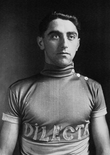 Ferdinand Le Drogo, cycliste